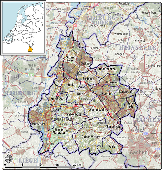 Kaart van Veiligheidsregio Zuid-Limburg, met indeling van gemeenten (2012) en impressie van het landschap. Referentie-ondergrond (kustlijn, steden, wegen) gerasterd uit de OpenStreet Map OSM. Inhoud is beschikbaar onder de Creative Commons Attribution-ShareAlike 3.0 license. Referentie-ondergrond op water bewerkt vanuit Gebruik is vrij met bronvermelding NLR en ESA. Vectorgrenzen van gemeenten op basis van het vrij te gebruiken geo-bestand van het CBS. Hoogte-aanduidingen (reliëf) gerasterd uit de AHN Viewer ( gebruik is vrij met bronvermelding (c) AHN, Overige kenmerken op de kaart: eigen tekenwerk.